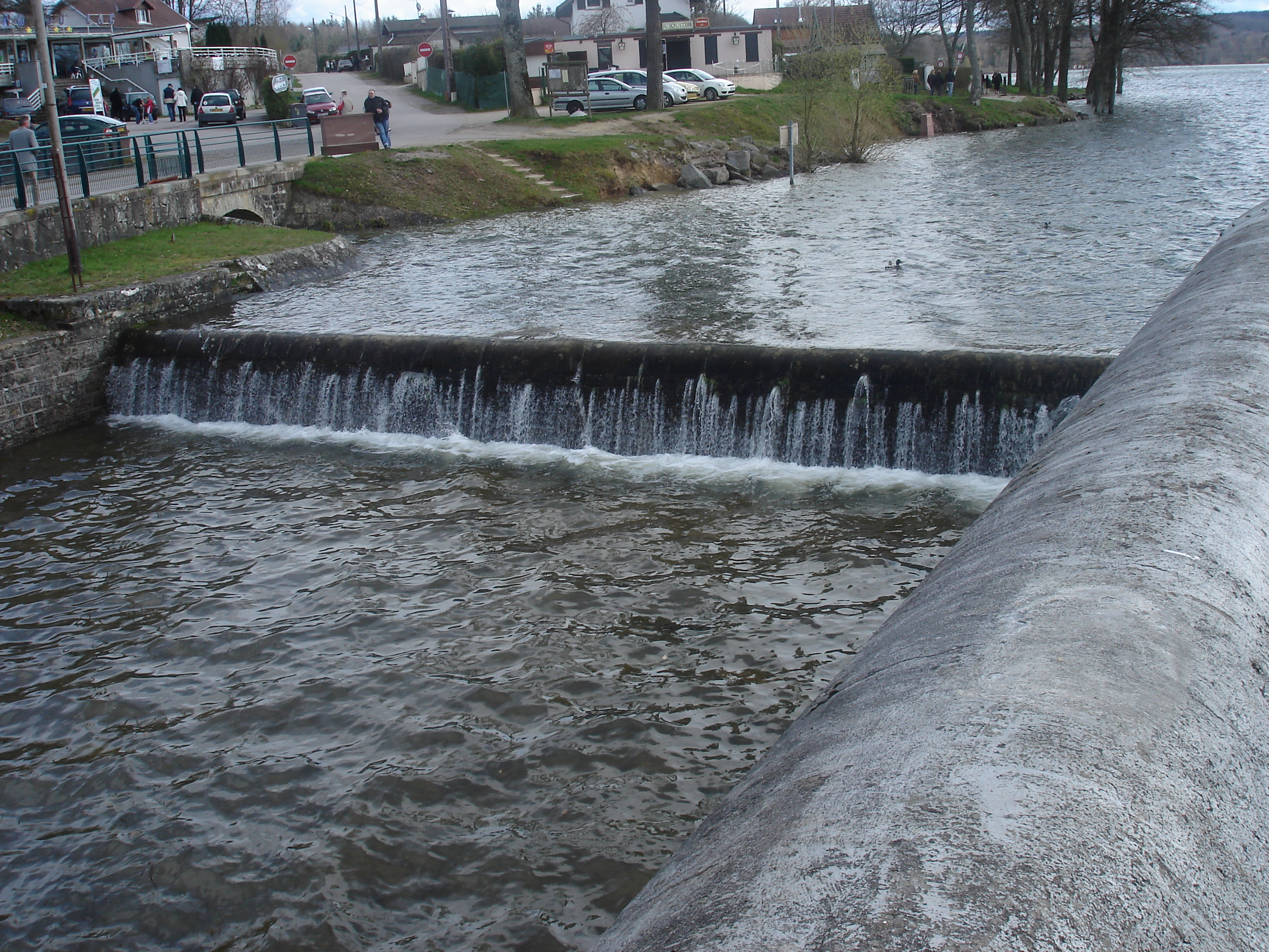 lac de bouzey